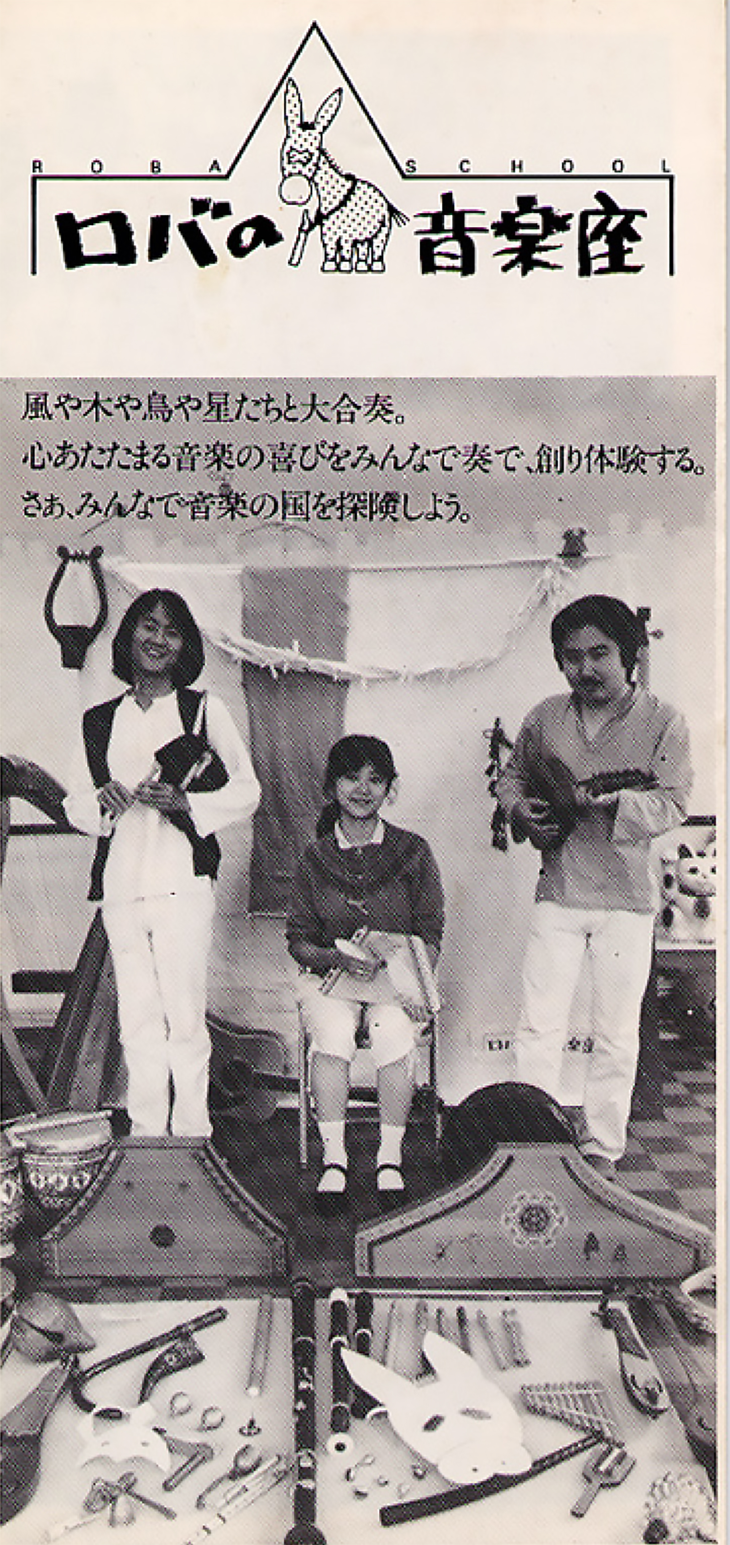 1982年 初期メンバー